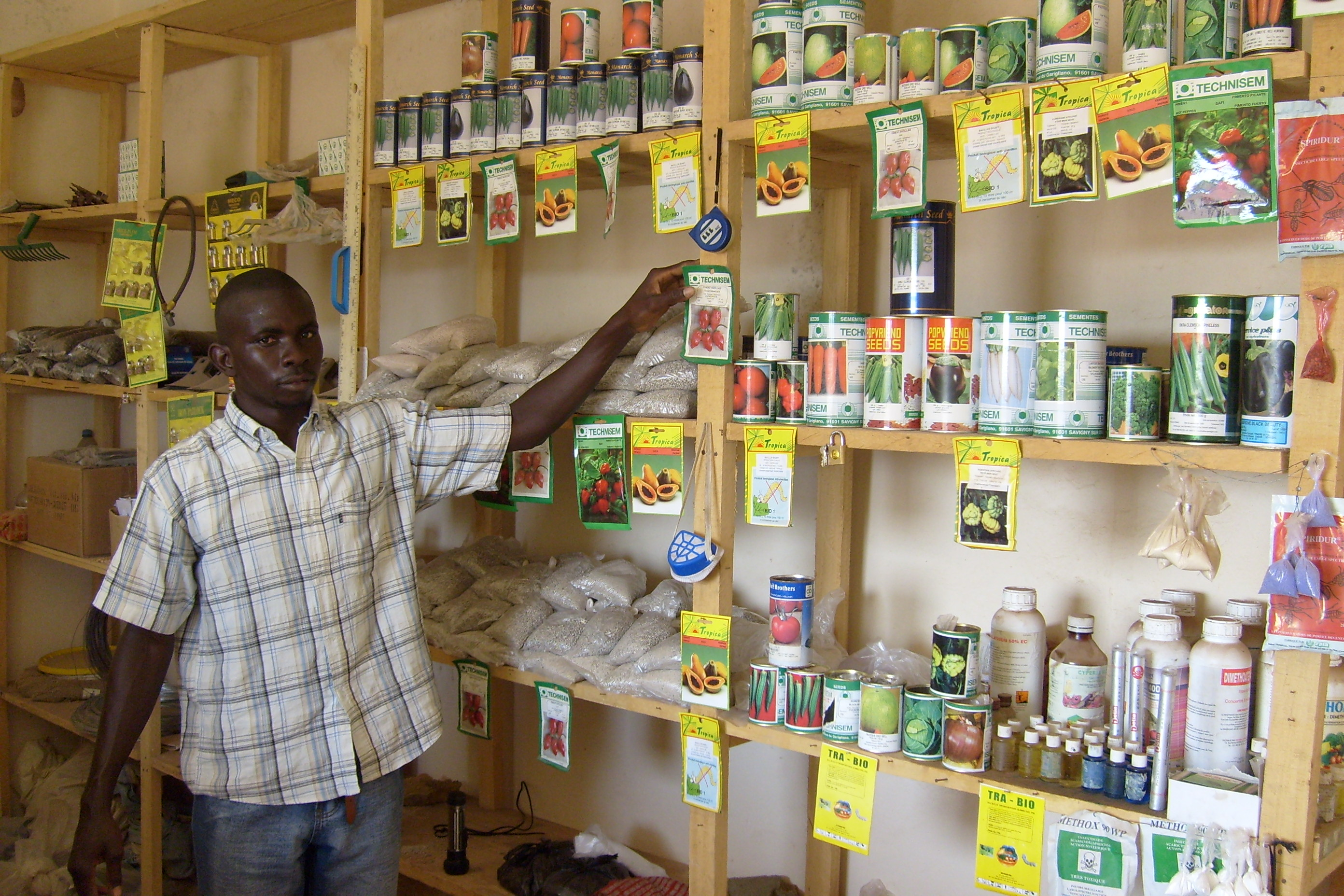 Epicerie à Kaffrine (Sénégal)